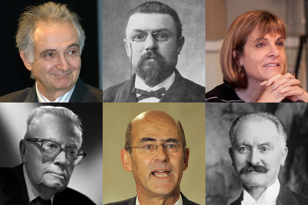 License is probably wrong. I have created this image based on 6 images on Wikimedia Commons